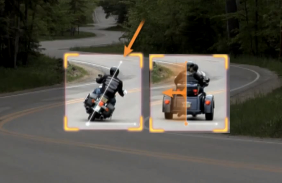 Position comparée d'une moto et d'un trike (ici un Tri Glide Harley Davidson) dans un virage montrant que ce dernier est fortement soumis à la force centrifuge